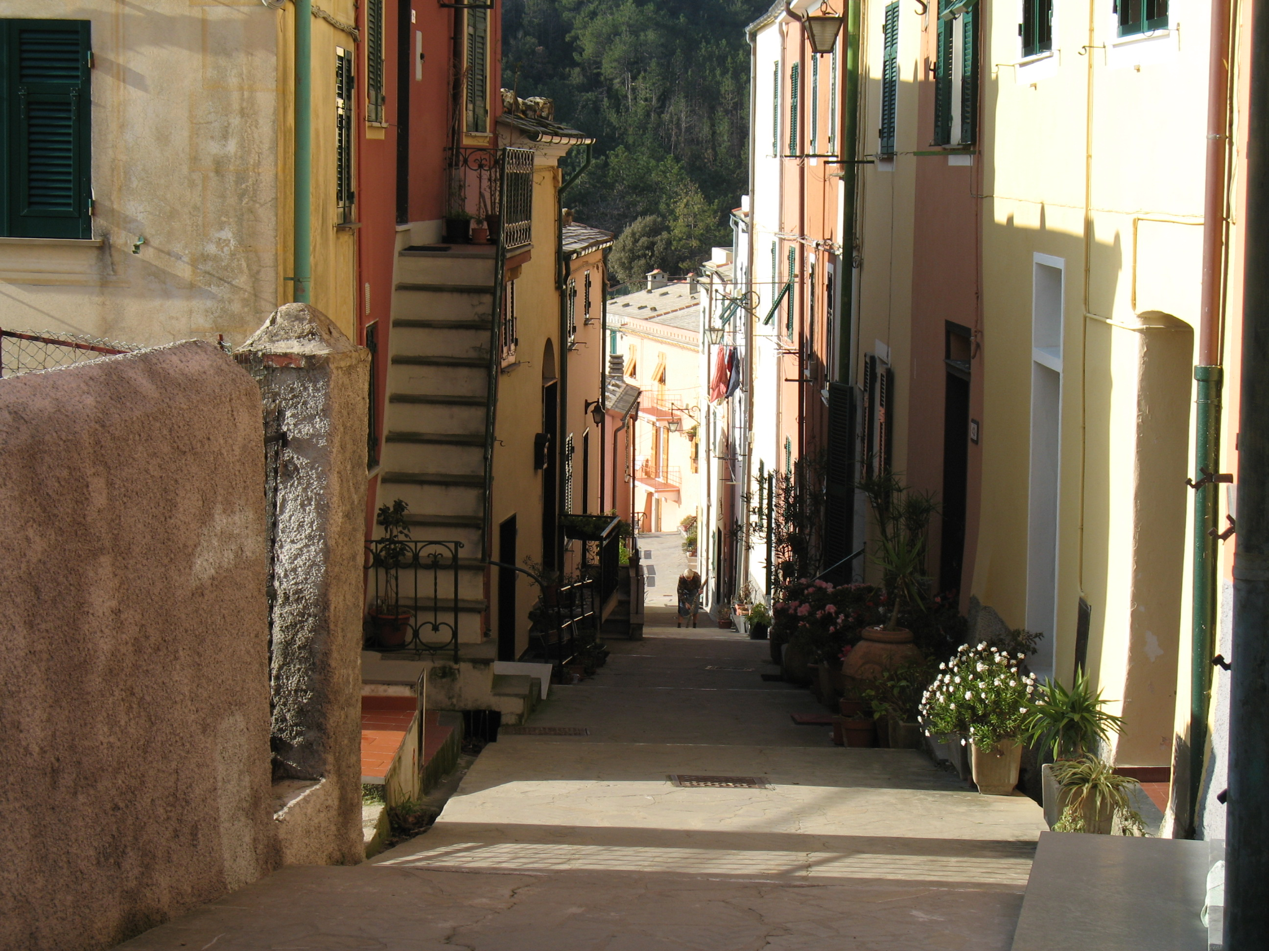 Immagine dalla Riviera ligure